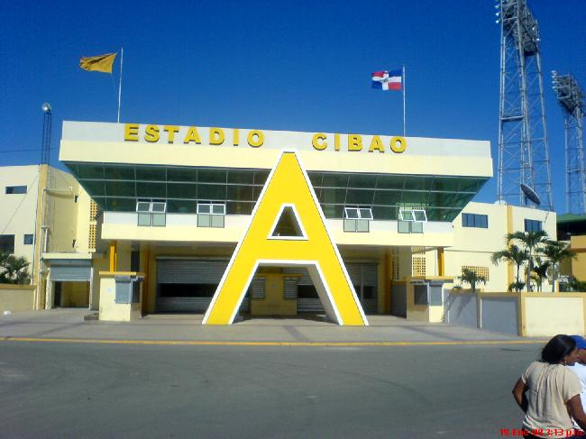 Vista de la entrada principal en la parte frontal del Estadio Cibao